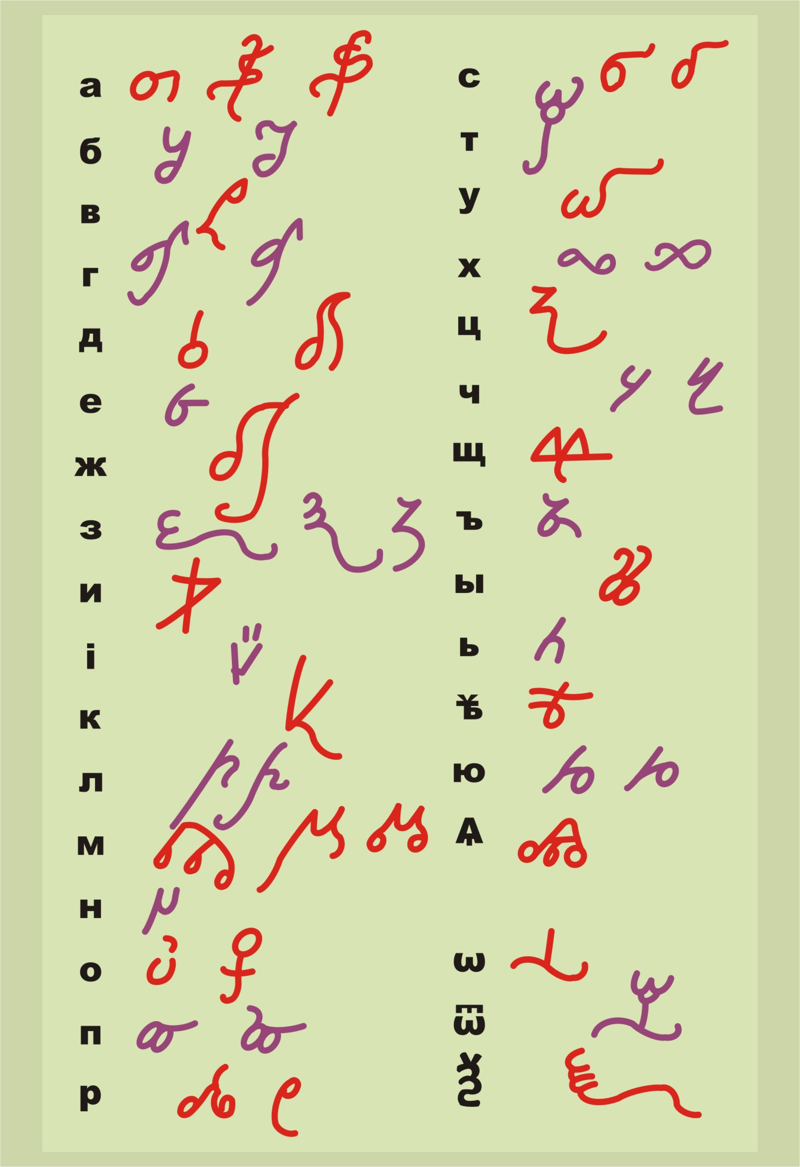 Ключ к тайнописи из хронографа XVII века.